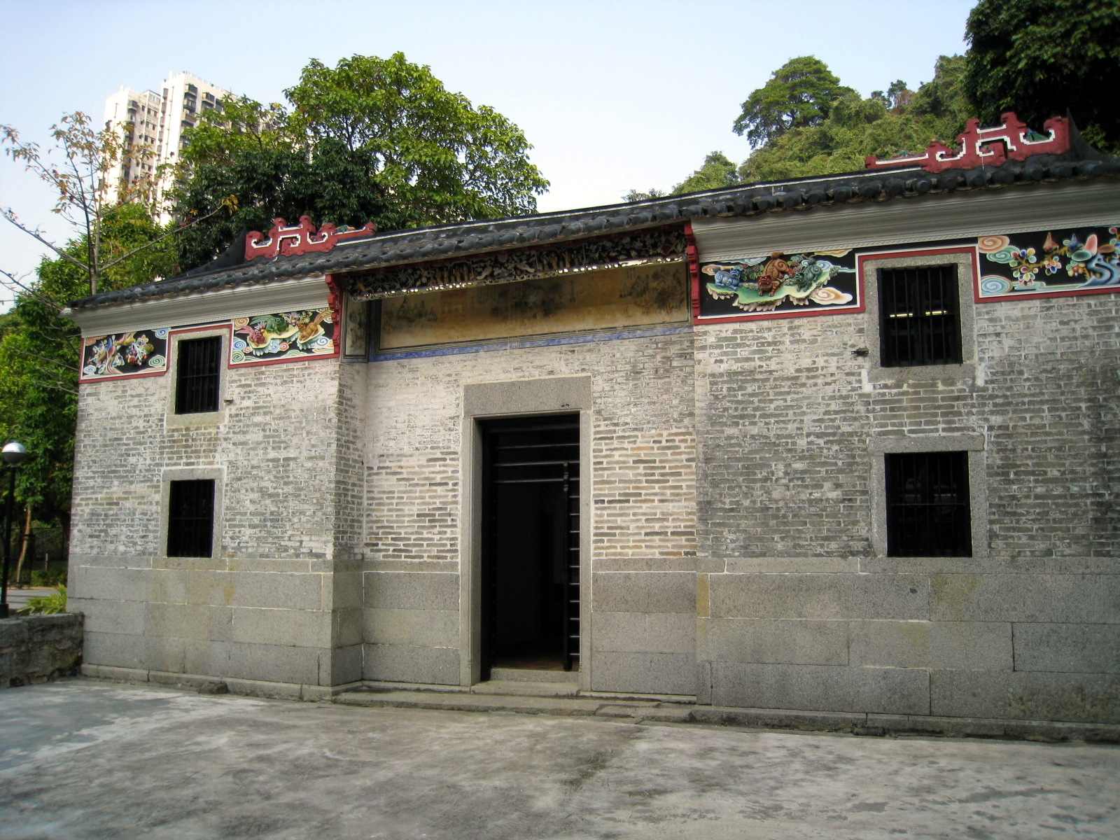 HK Wong Uk Village Frontview